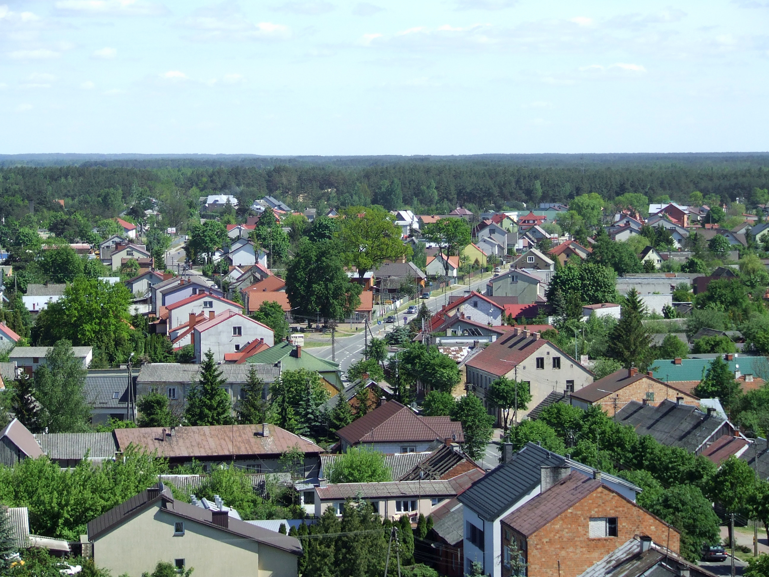 Myszyniec (na południowy wschód od bazyliki) widziany z wieży kościoła